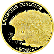 Памятная монета Белоруссии